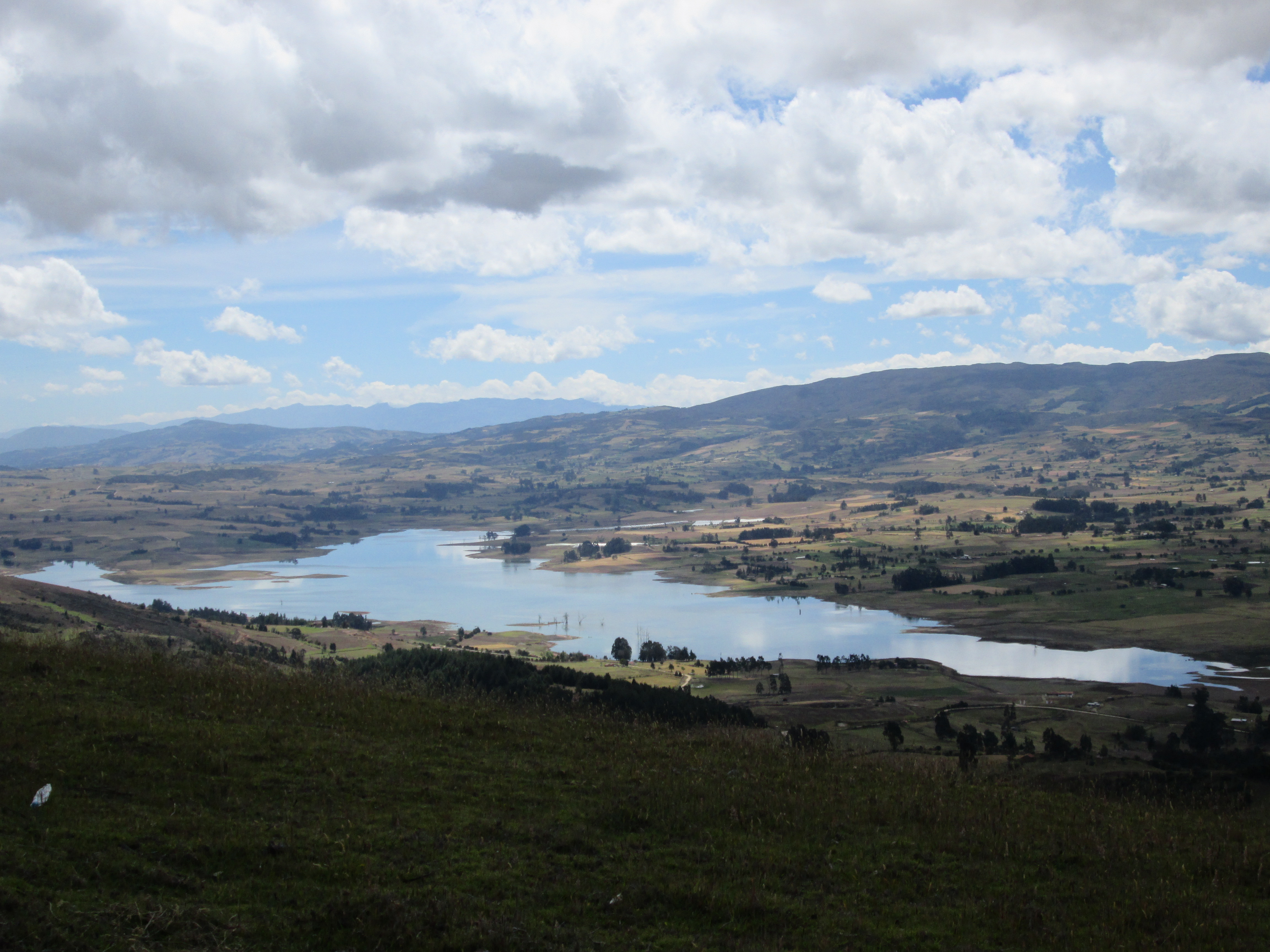 Vista de la represa de la copa desde el pico de Rátiva